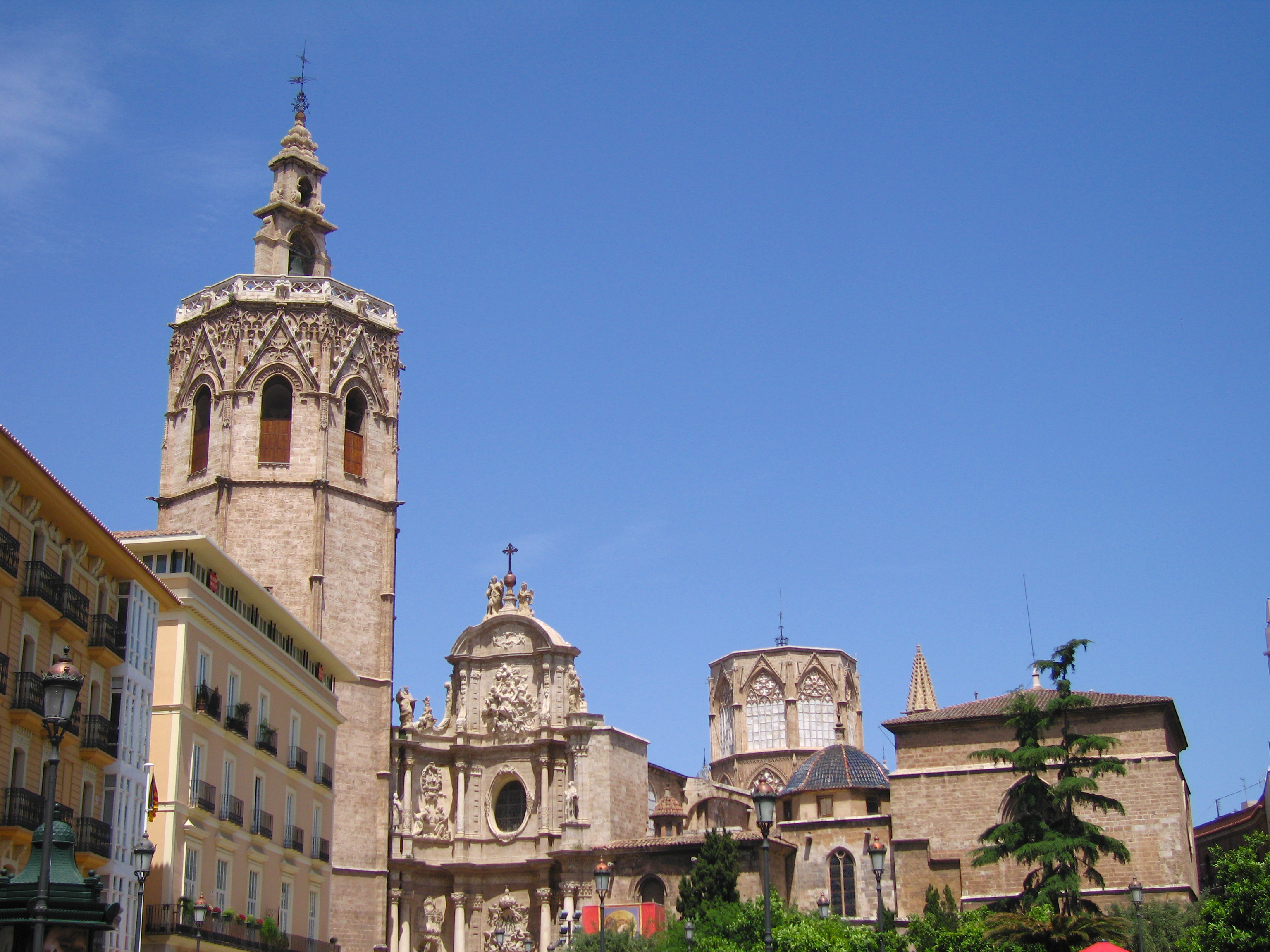 Seu de València (Des de plaça reina)